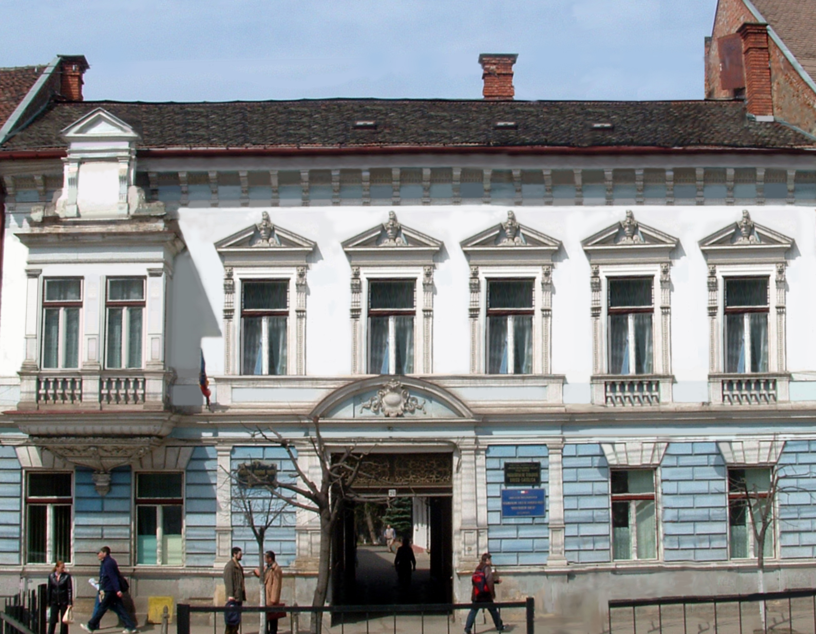 Sediul Episcopiei Române Unite cu Roma, Greco-Catolice Cluj-Gherla mun. Cluj-Napoca, str. Moților, nr. 26